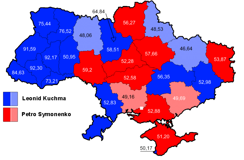 Вибори в Україні 1999